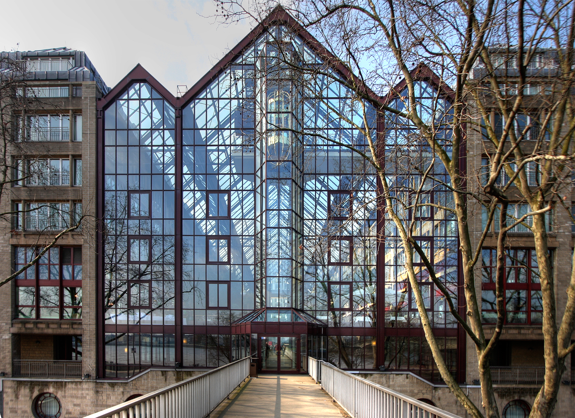 Maritim-Hotel in Köln, Rheinseite (Osten). Architekten: KSP/Gottfried Böhm